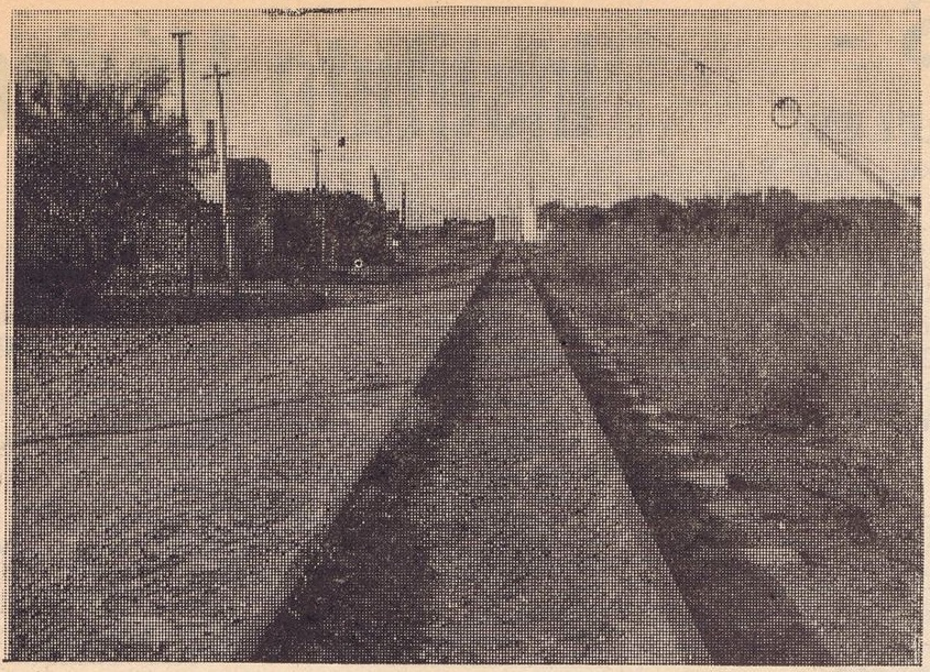 Vías en la Avenida Tello de Rawson antes de ser retiradas en 1967. Se nota su mal estado de conservación tras el cierre del ramal en 1961